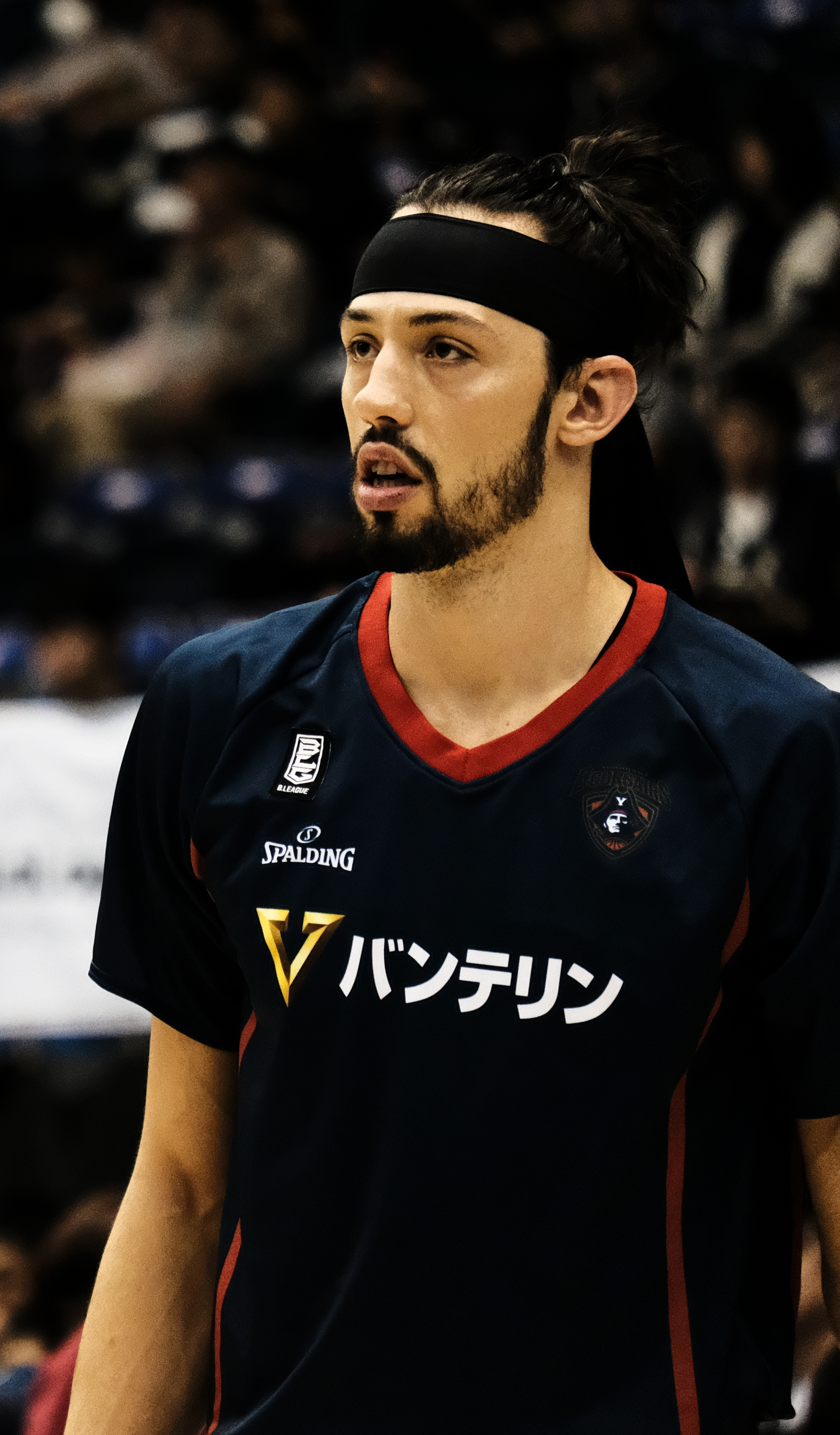 横浜ビーコルセアーズvs滋賀レイクスターズ